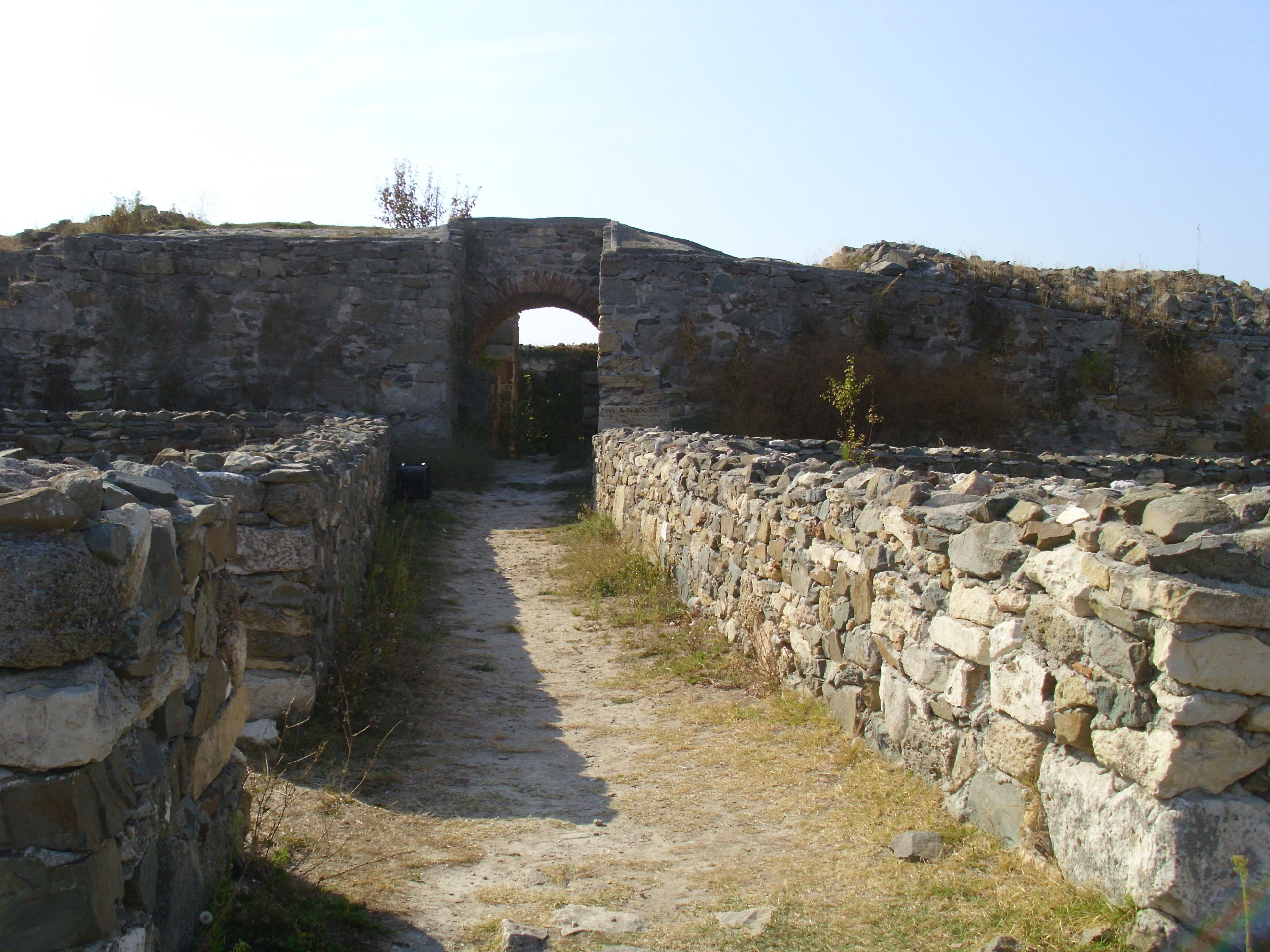 Histria. Turnul cetatii (A sau B) 01